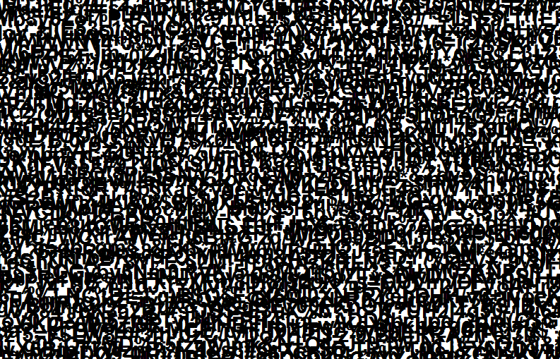 Zahlenmeer